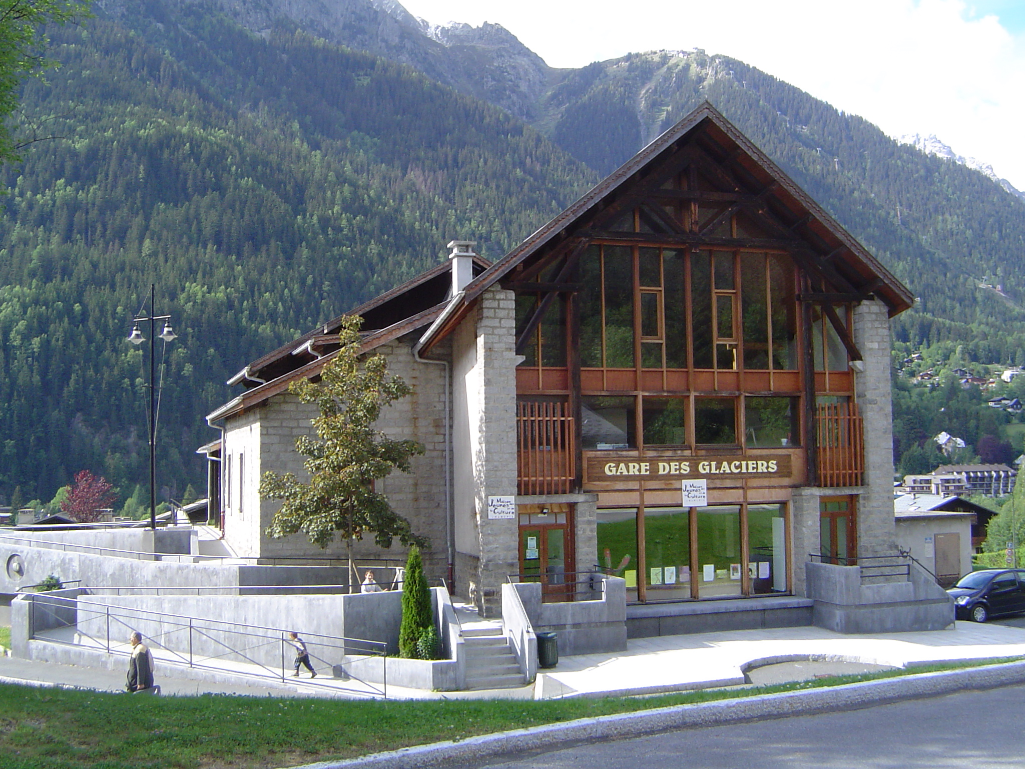 Photo prise dans le quartier des Pélerins à Chamonix-Mont-Blanc (France)